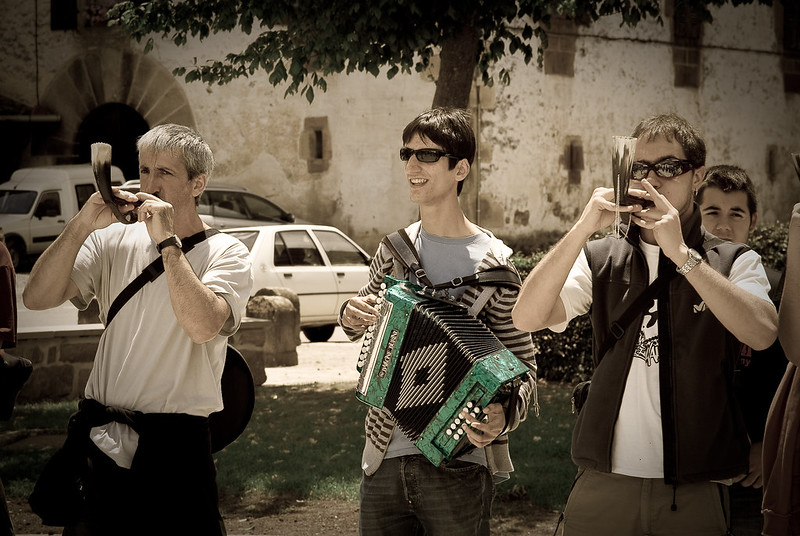 Alboka topaketa 2 (Egilea: Iker Etxebarria Urkaregi)